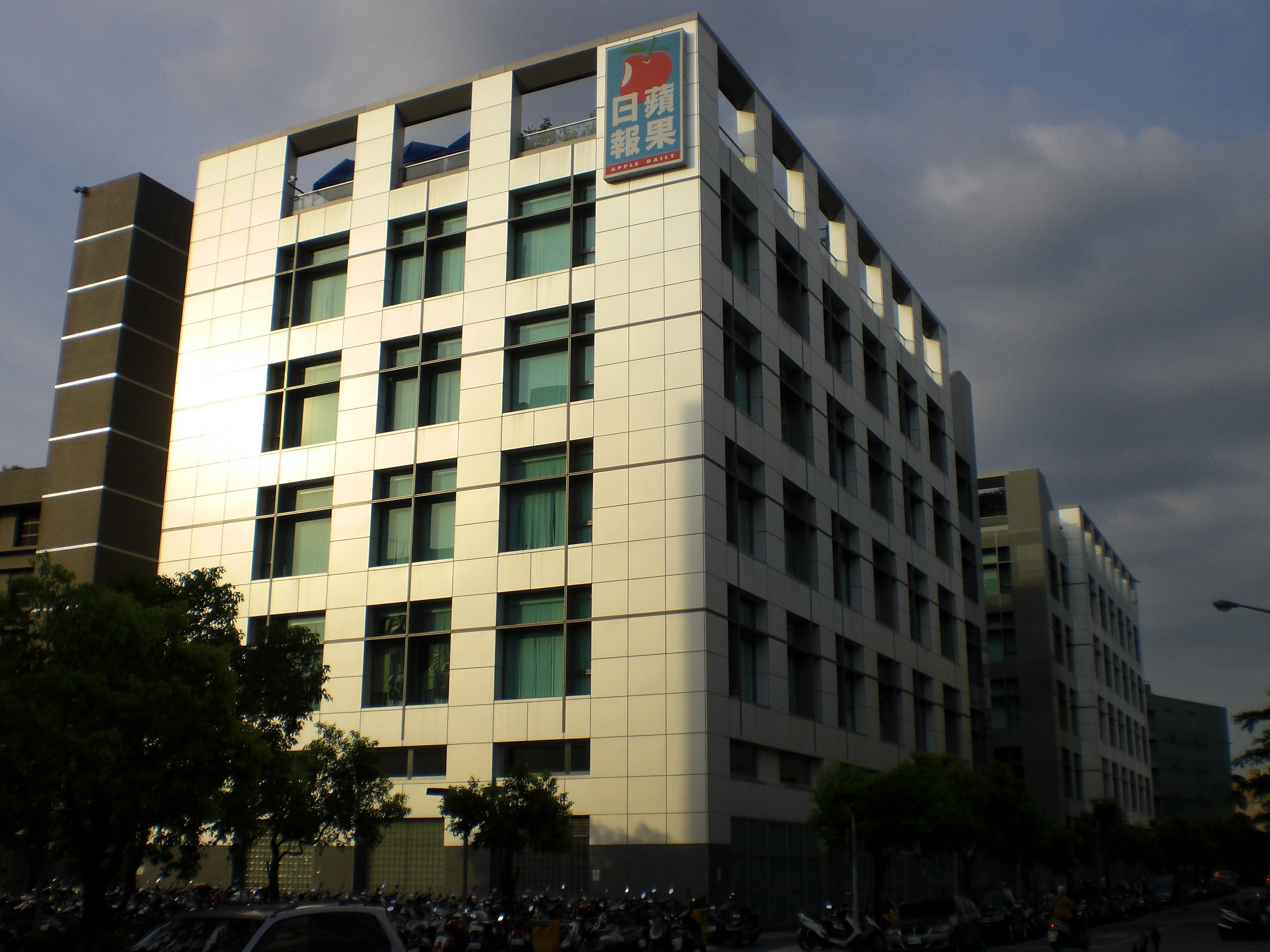 台北市內湖區行愛路台灣蘋果日報總社